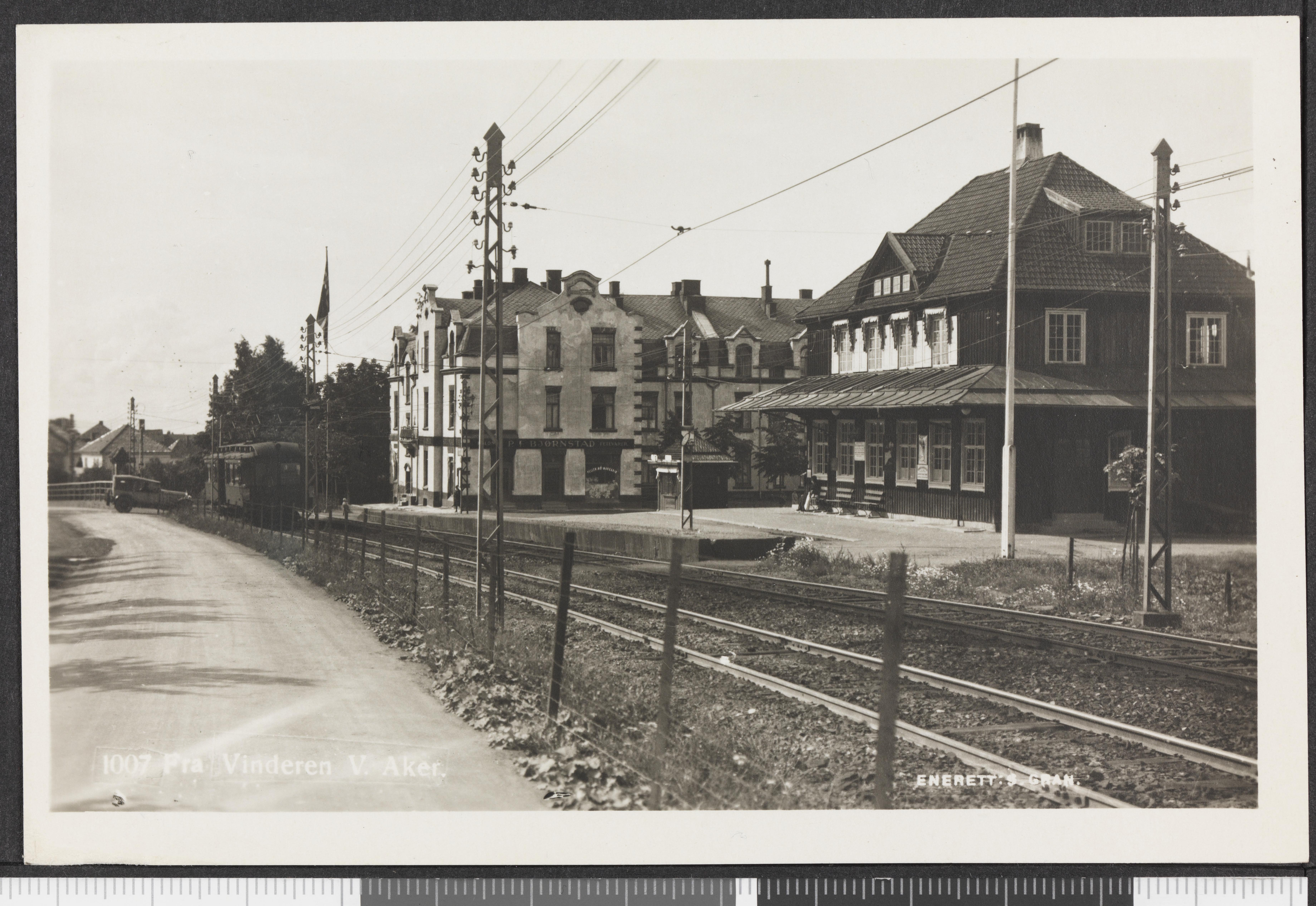 Bildet er hentet fra Nasjonalbibliotekets bildesamling Vinderen,Vinderen stasjon, Oslo, Oslo